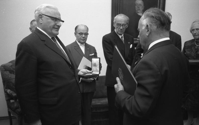 Verleihung von Bundesverdienstkreuzen an Bundestagsabgeordnete durch Bundestagspräsident Dr. Gerstenmaier (links: Heinrich Scheppmann (CDU/CSU))